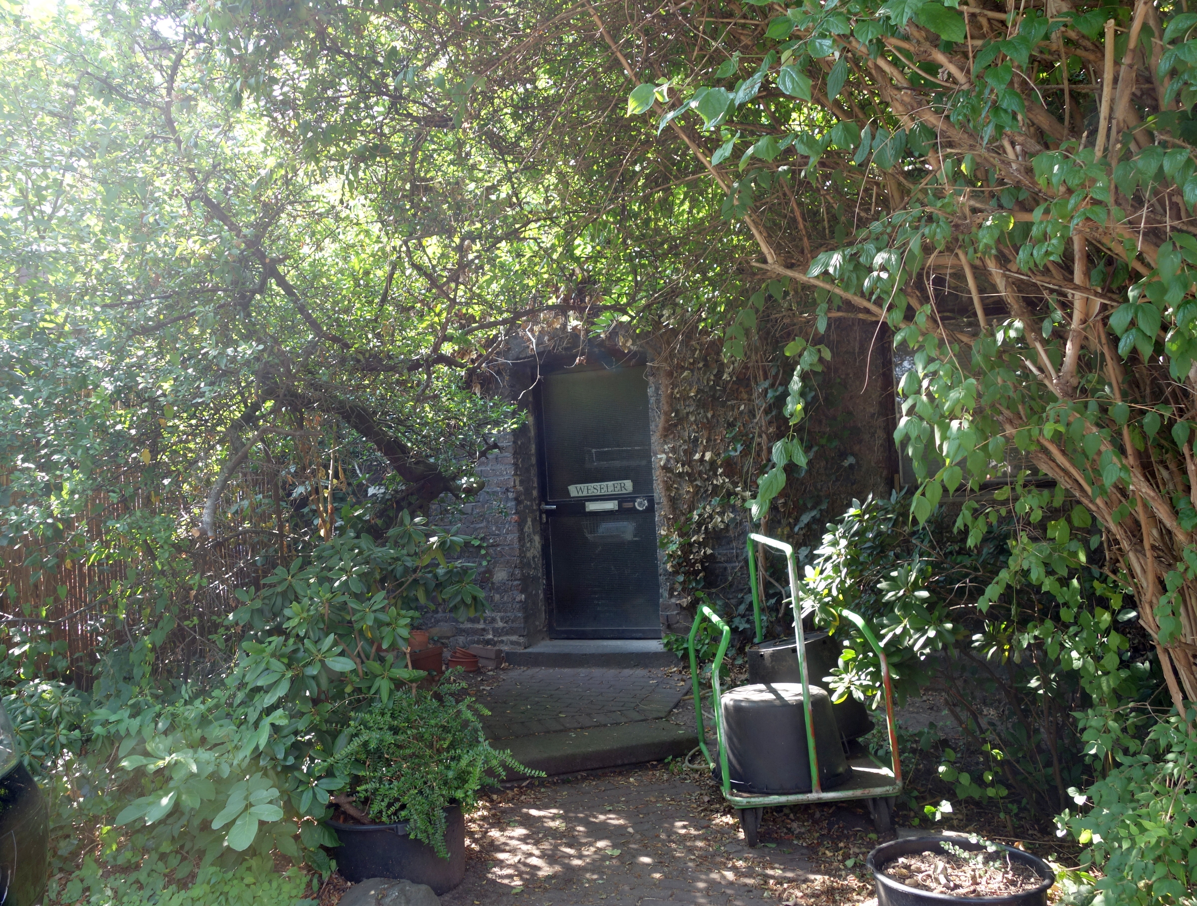 Atelier Günter Weseler, Düsseldorf-Niederlörick, Bonifatiusstraße 57, Germany.